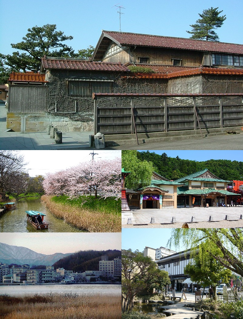 石川県加賀市のモンタージュ